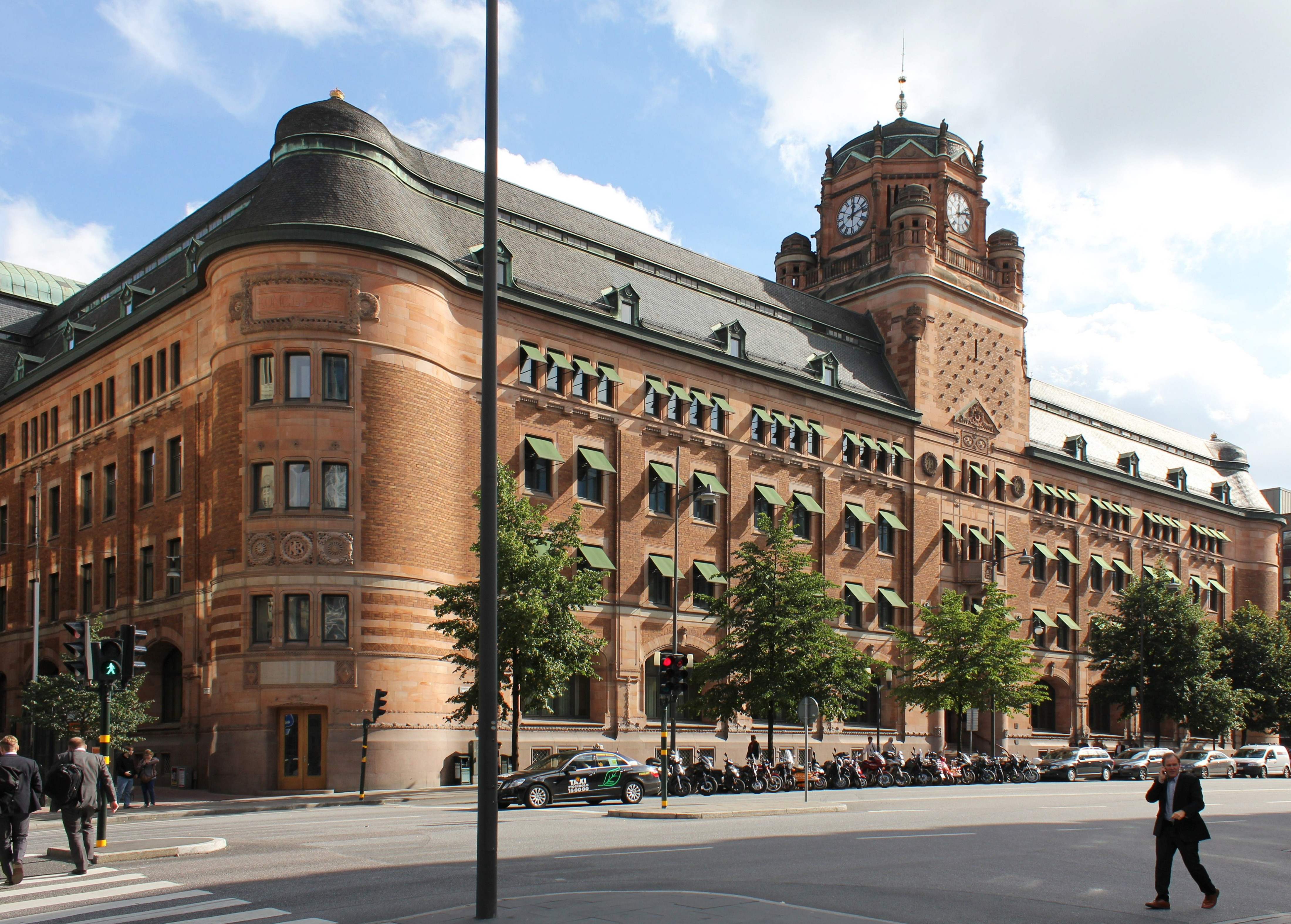 Centralposthuset i Stockholm.